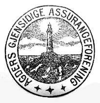 Logo til selskapet Agders gjensidige Assuranceforening